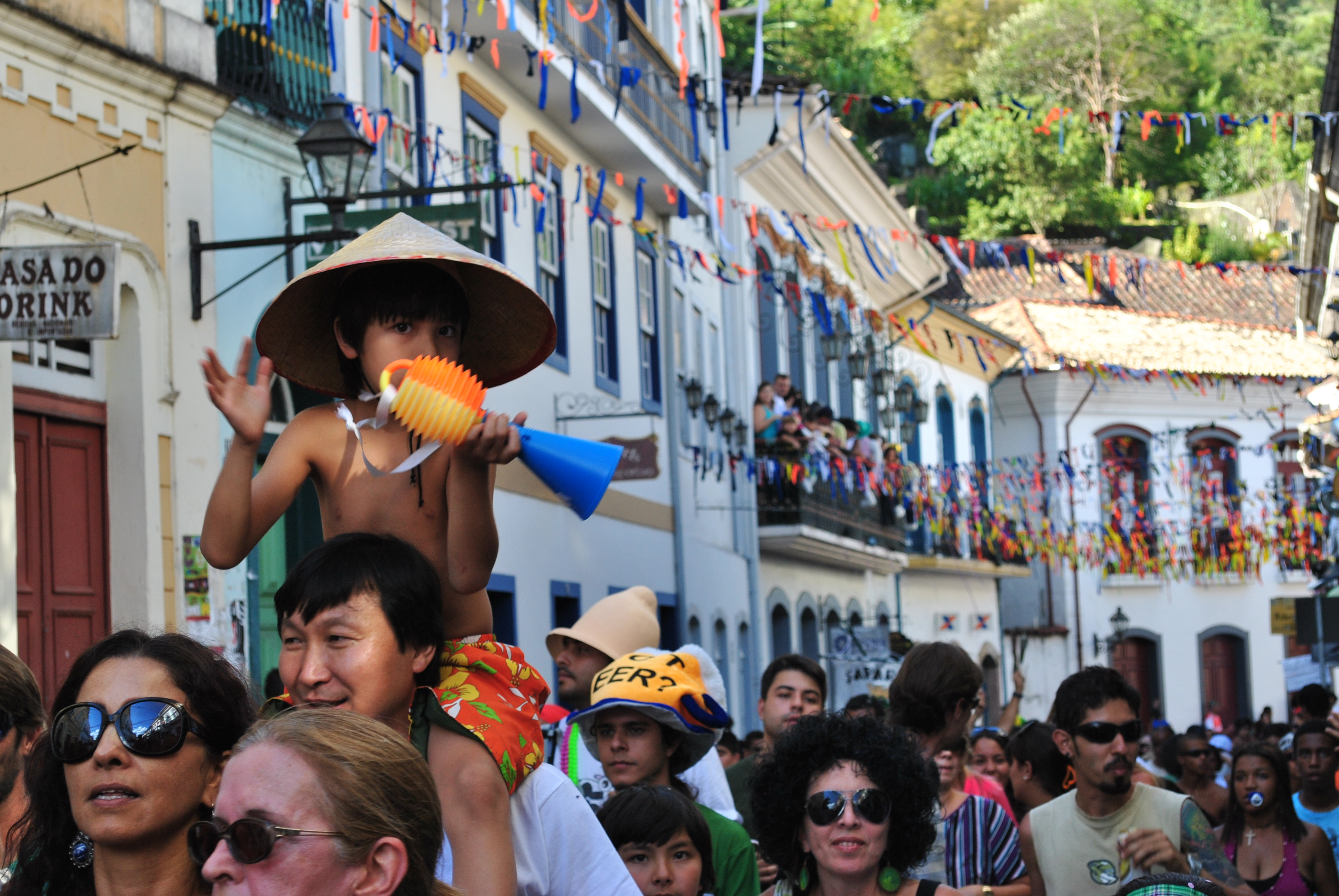 Carnaval 2010 - Ouro Preto - MG / Brasil. Poucas fotos, estava sem máquina. Algumas fotos foram sensuradas. Então aqui só vai a amostra grátis.